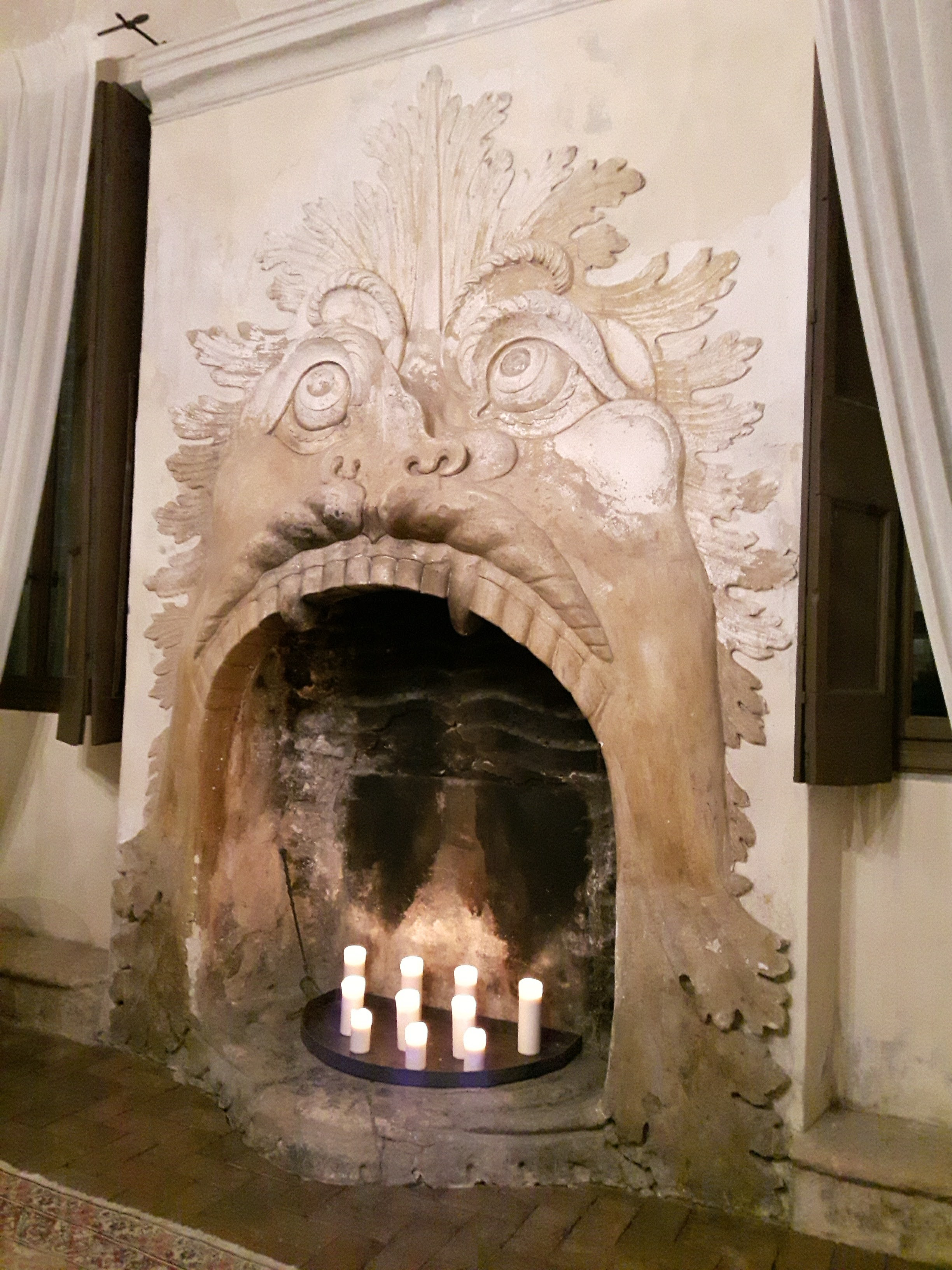 CAMINO DEL PESCE O MOSTRO MARINO. I Mascheroni (diavolo, angelo, pesce o mostro marino, leone ) che ornano le stanze della villa veneta sono ironici stupendi camini: animati da uno spirito grottesco, immortalano originali sembianze animalesche.